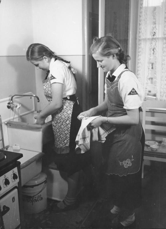 Ein Berliner Mietshaus hat Kriegsdienstpflichten. 5. Auch die Jugend hilft in der Nachbarschaftshilfe. Diese beiden Mädels vom BdM stellen sich täglich ein, um den Abwasch zu erledigen. Da sie regelmässig erscheinen, helfen sie tatkräftigst der Straßenbahnschaffnerin, die nach ihrer Rückkehr vom Dienst ihre Küche sauber und geputzt vorfindet.